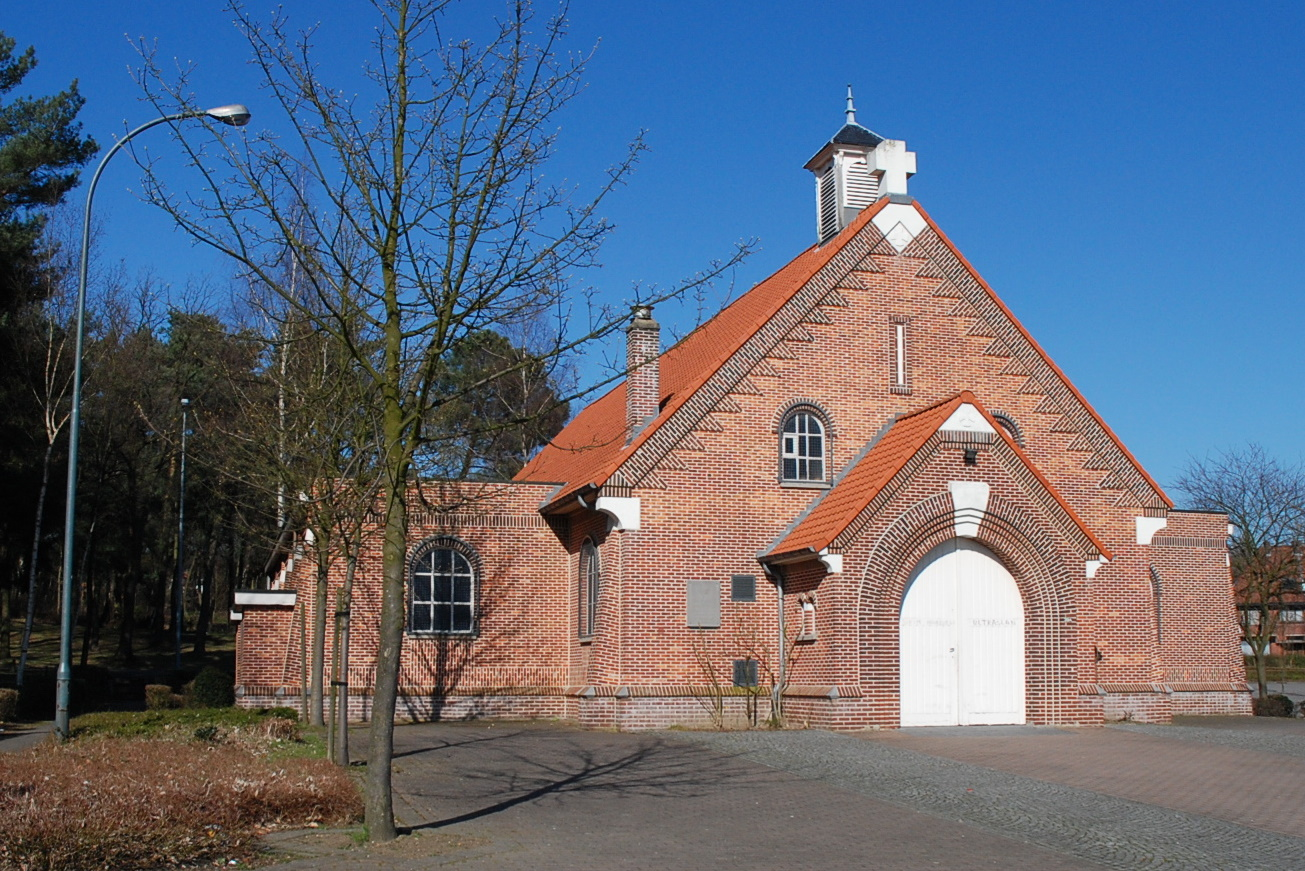 De kerk van Meulenberg, een wijk van Houthalen (België)